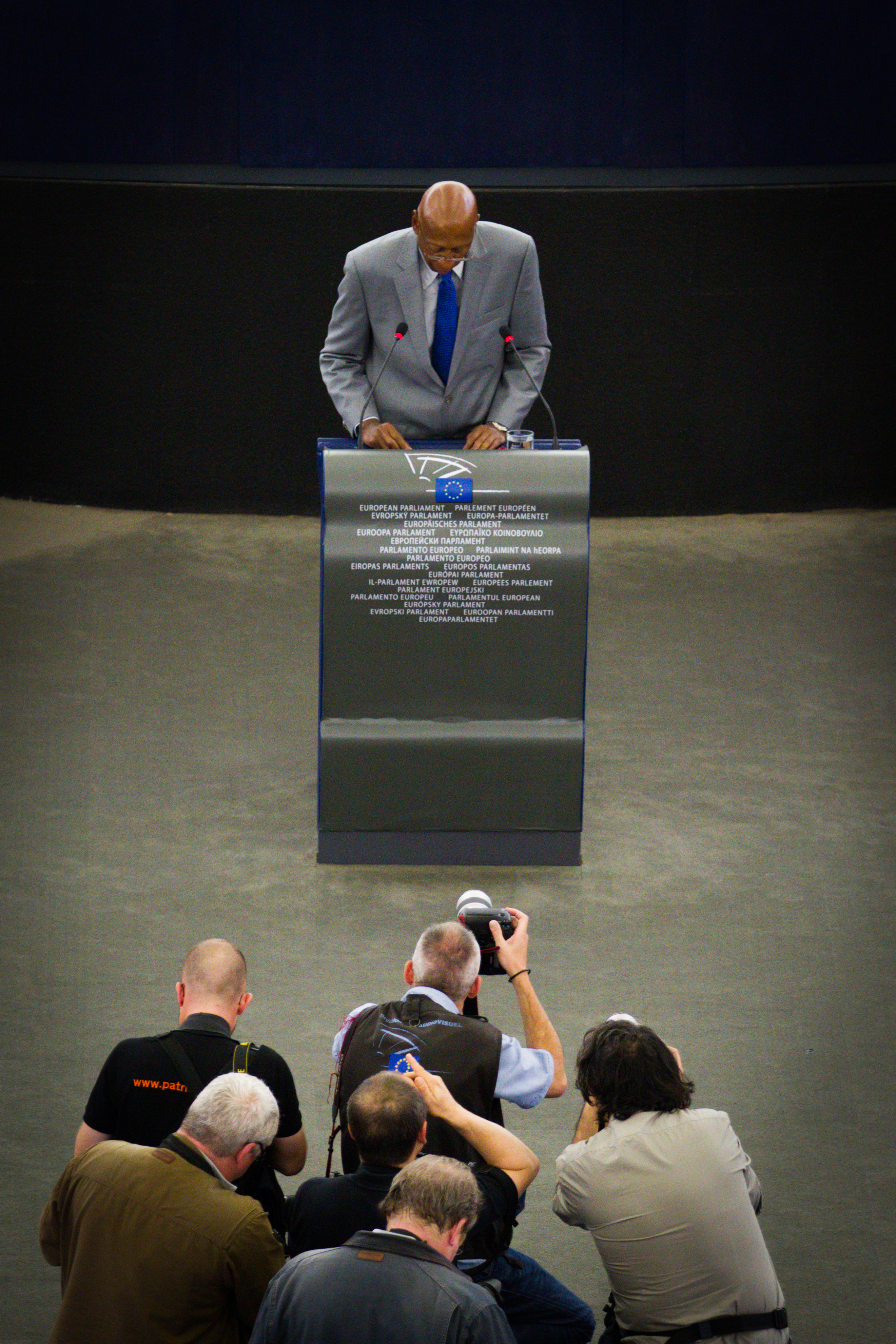 Remise du prix Sakharov 2010 à Guillermo Fariñas Strasbourg Parlement européen le 3 juillet 2013